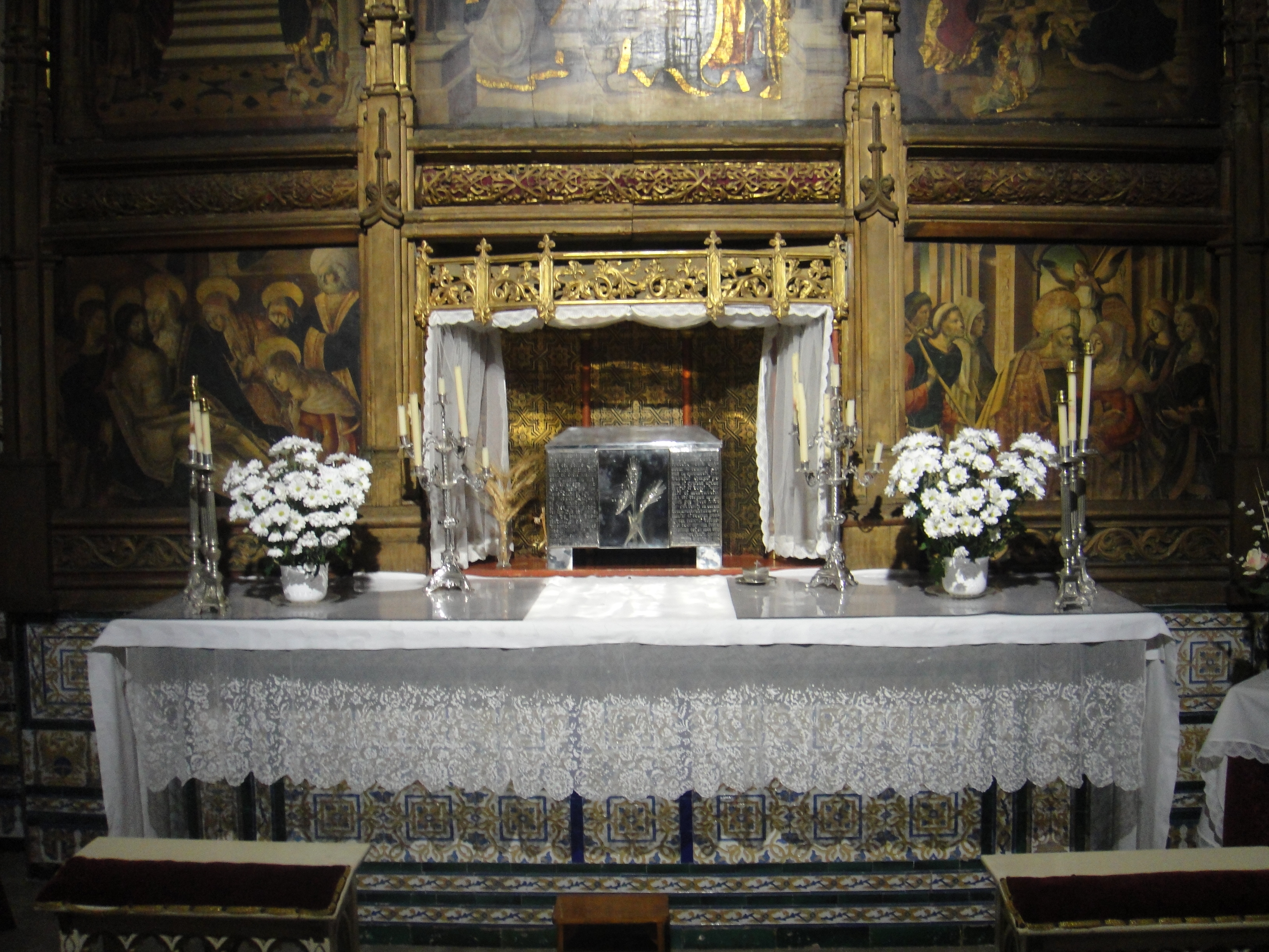 Sagrario en la capilla del Sagrario de la iglesia de Nuestra Señora del Castillo de Fuente Obejuna, provincia de Córdoba, (España).